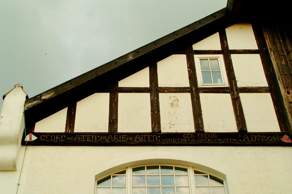 Sie haben ein besseres Bild? Sogar ein historisches Dokument als Bild(ungsförderung)? Zeigen Sie' s uns. Stiften Sie es, allen Menschen.